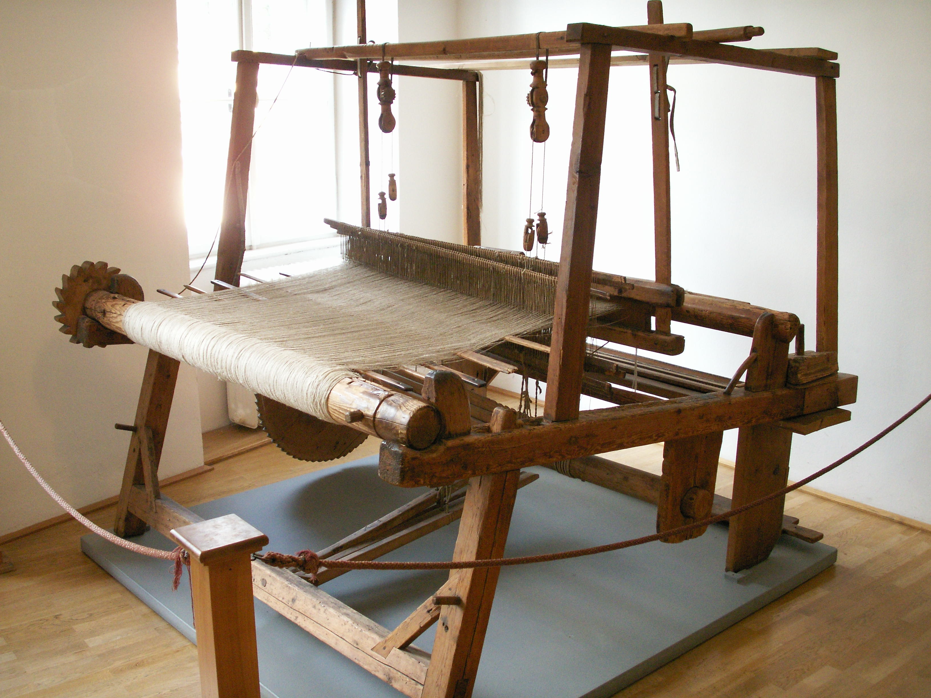 Handwebstuhl